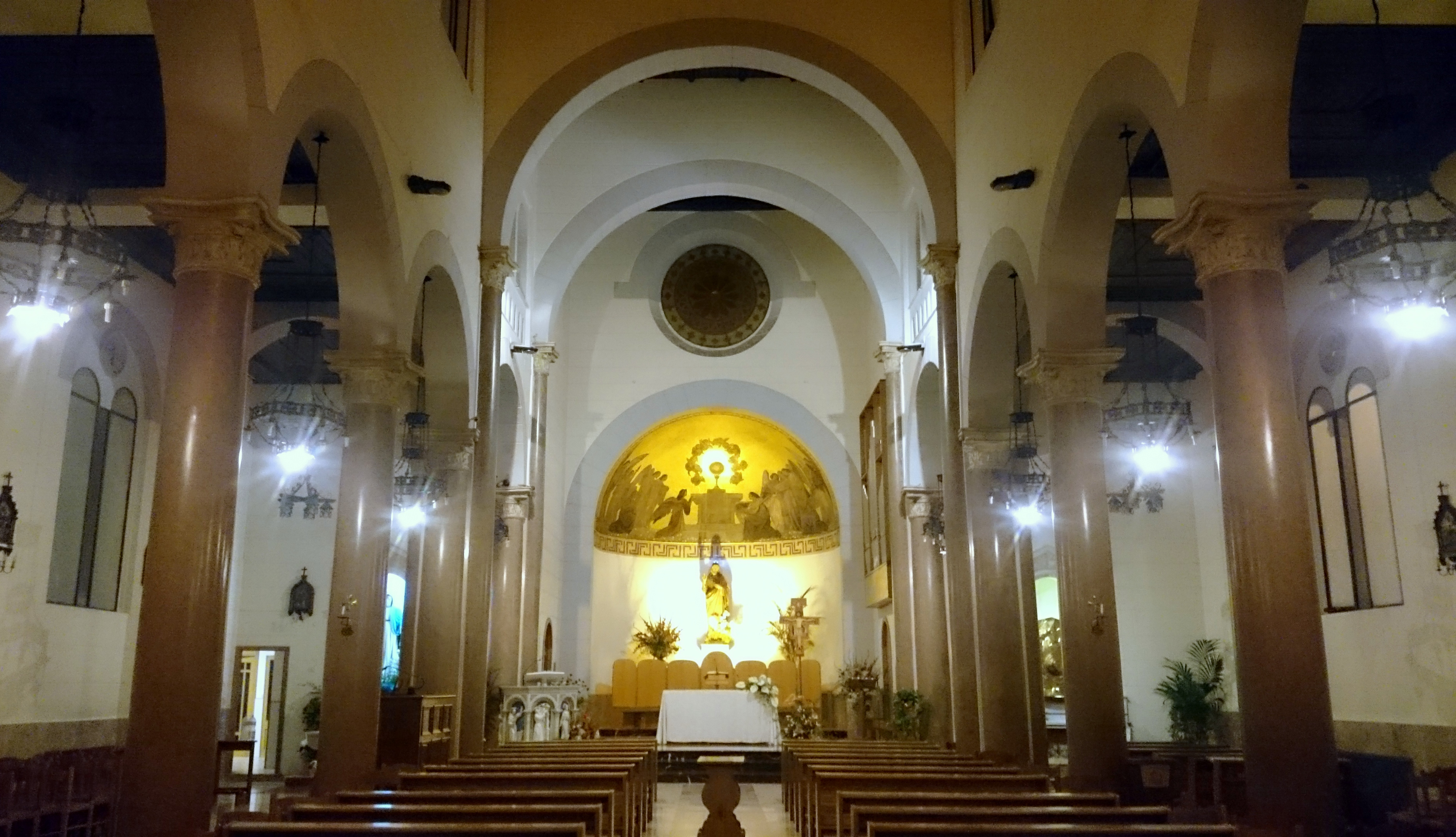 Interno della chiesa del Sacro Cuore di Gesù a Salerno. Foto di sera